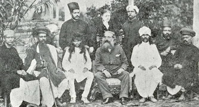 Helena Petrovna Blavatsky (stehend mitte), Henry Steel Olcott (sitzend mitte) und Damodar Mavalankar (sitzend, 3. von links) auf einem Kongreß der Theosophischen Gesellschaft in Bombay (Mumbai) 1881